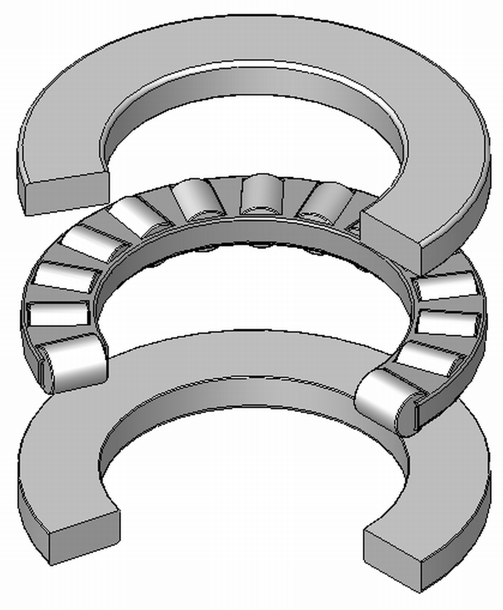 Axial-Zylinderrollenlager, Blechkaefig aus Stahl, zerlegbar, Explosionsdarstellung, 120°Schnitt, Hinweis: Innenaufbau des Lagers (insbesondere des Kaefigs) variiert je nach Hersteller und Baugroesse rolling contact bearings